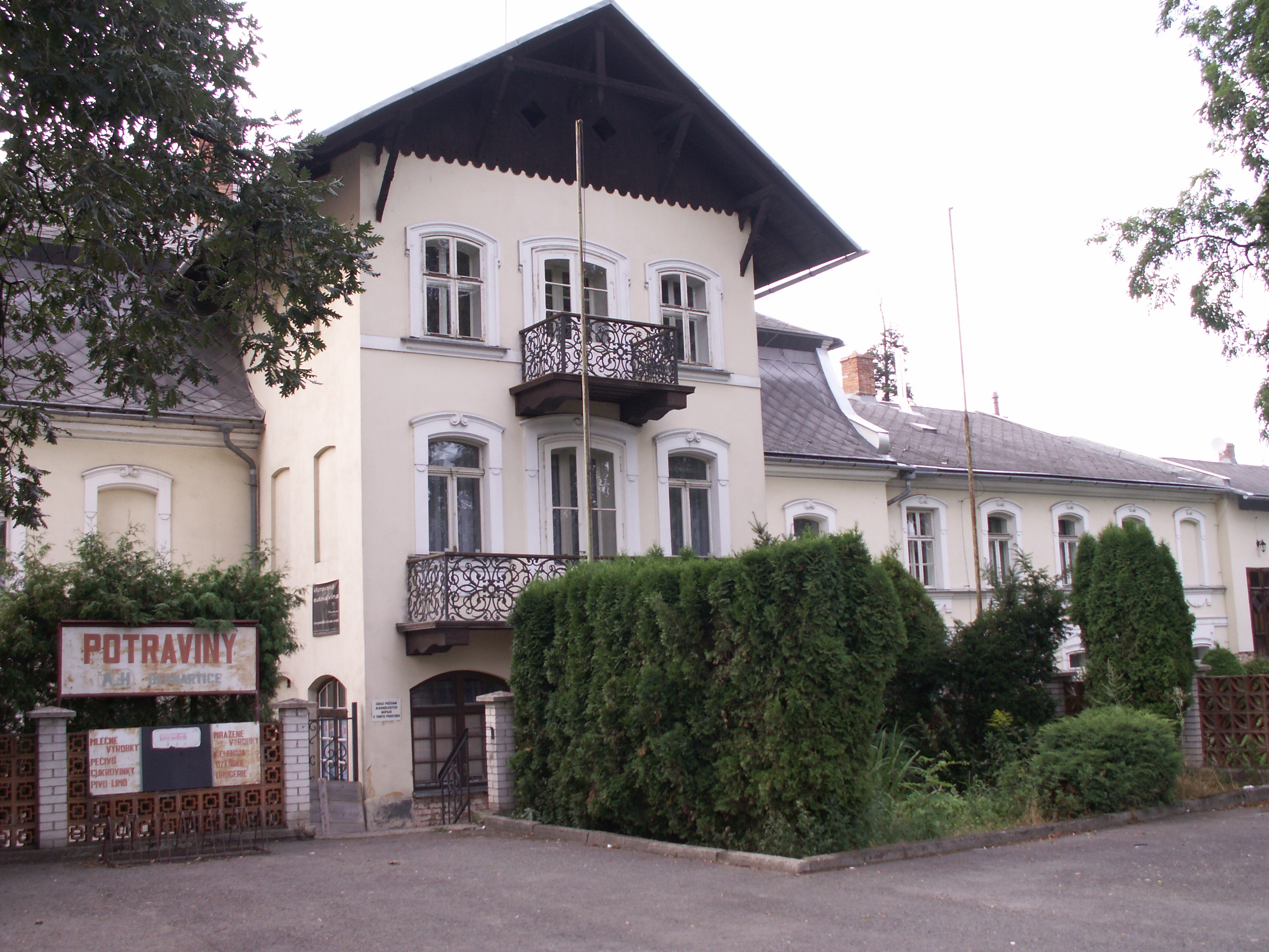 Bernartice, okres Jeseník, zámeček, sídlo zemědělského družstva Agroholding Bernartice